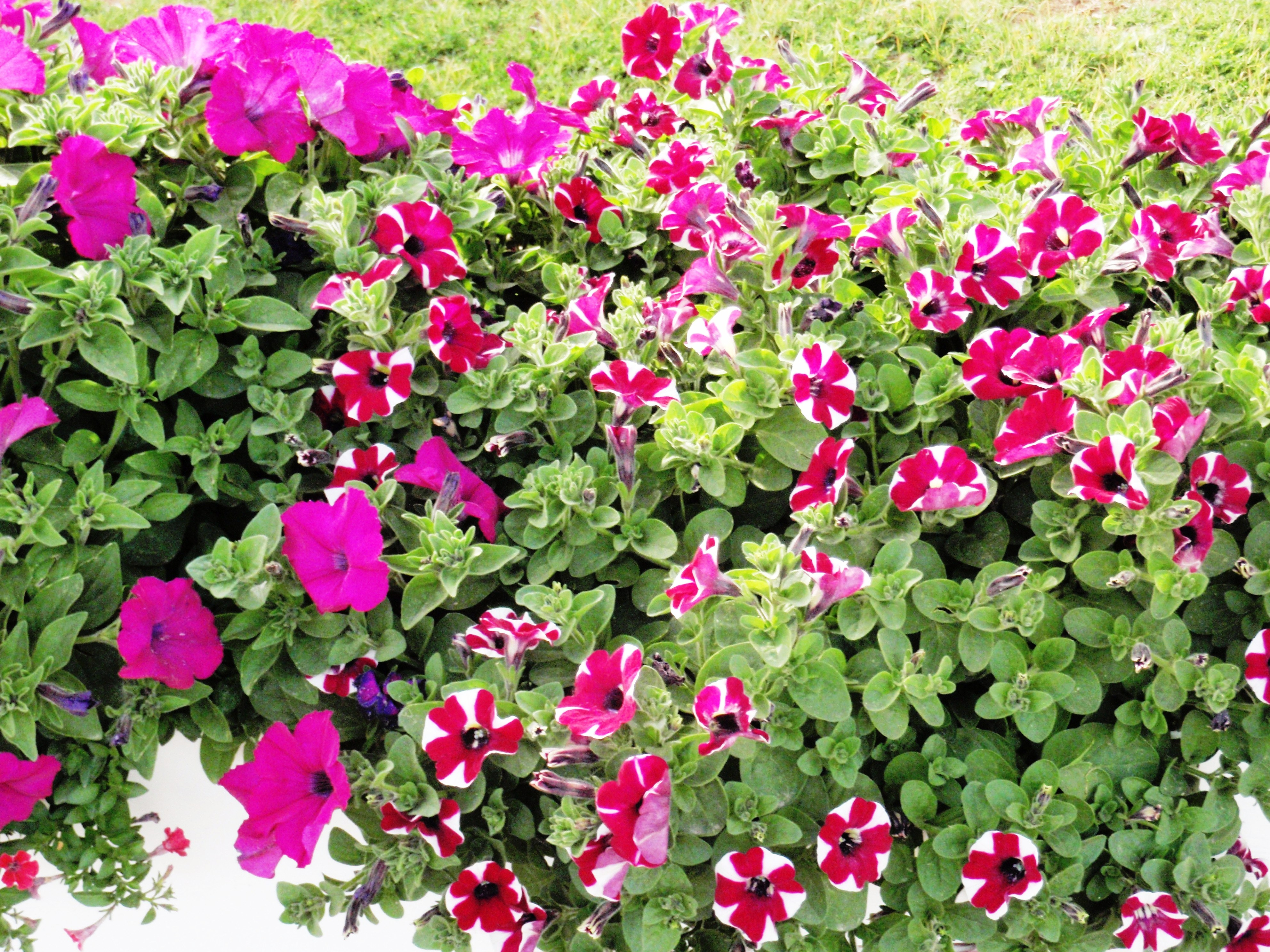 תבלינים פטוניה